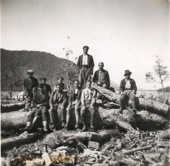 Trabajadores temporales de Chiloé en los años 1930